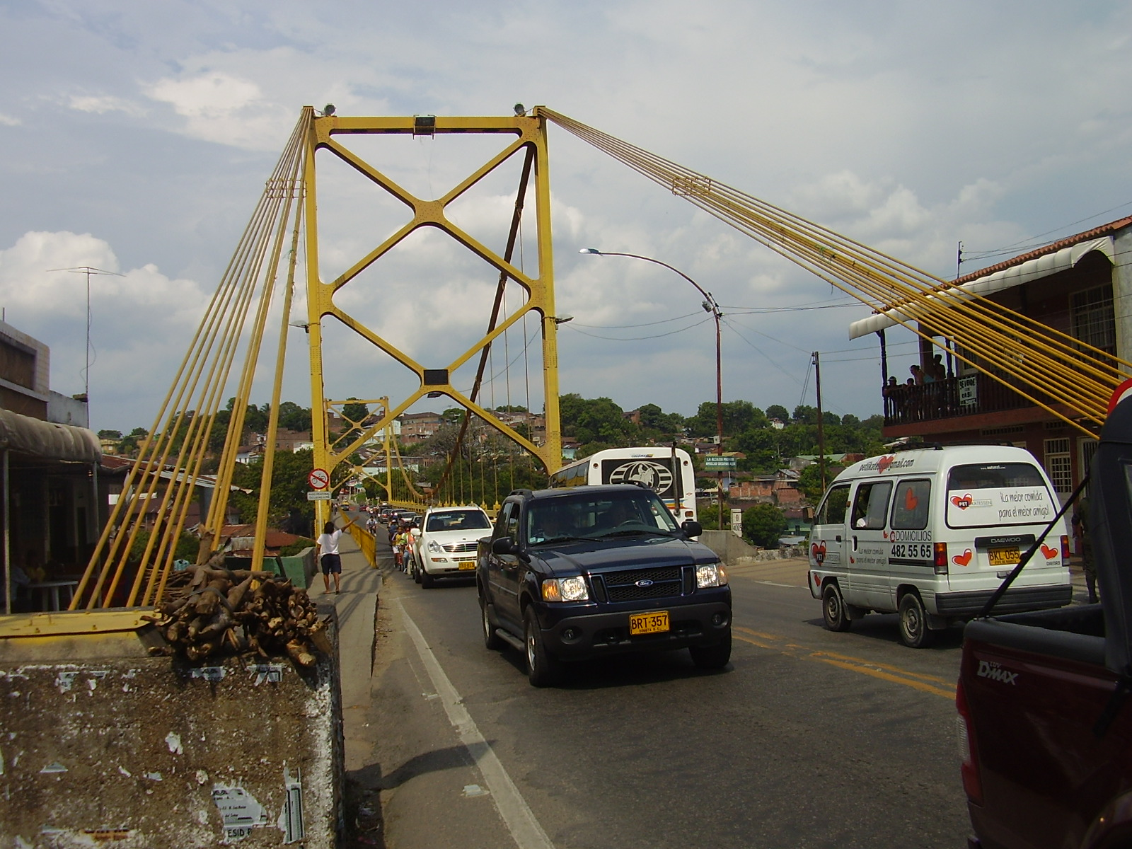 Puente vehicualar de sobre el magdalena, une las poblaciones de Girardot y Flandes